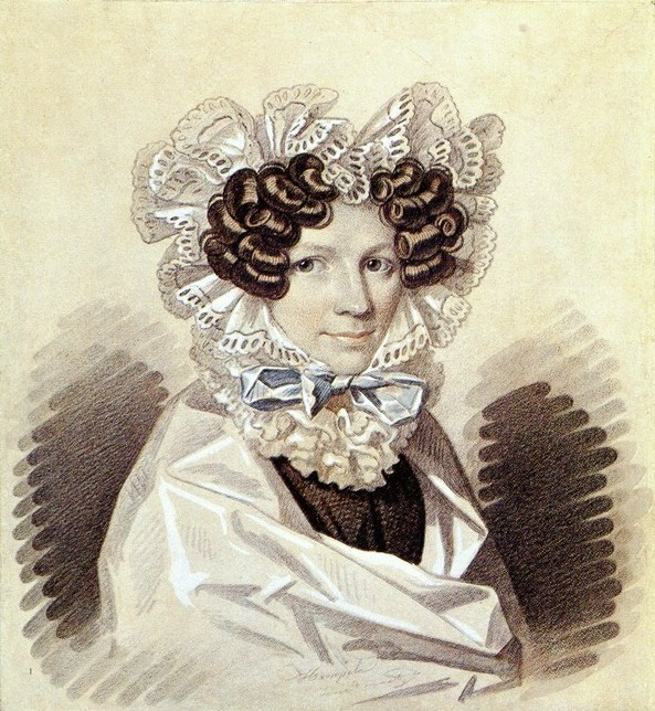 Мудрова Софья Харитоновна (1786-1833), урожденная Чеботарева. Дочь профессора и ректора Московского университета Х. А. Чеботарева. Жена профессора медицины Московского университета М. Я. Мудрова, который в Москве до 1811 года был домашним врачом родителей Пушкина.